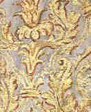 Santa Maria Bianca - affresco di Pietro da Napoli (sec XIV) - particolare del mantello